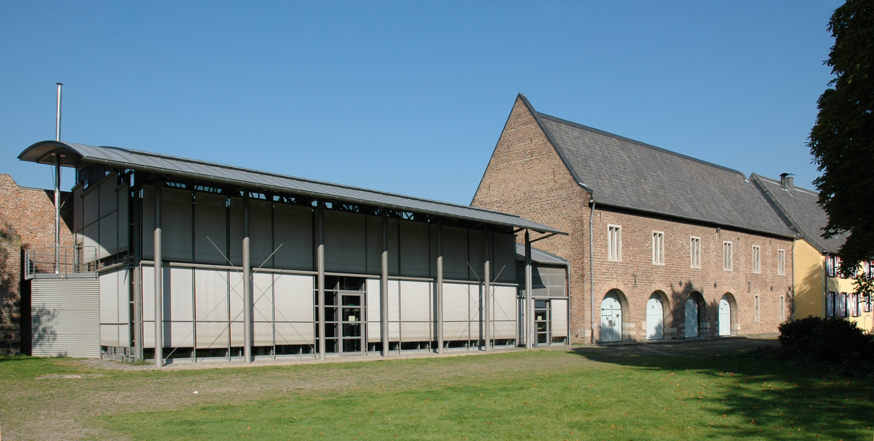 Burg Friedestrom in Dormagen-Zons, moderner Neubau des Kreismuseums und Knechthaus in der Vorburg